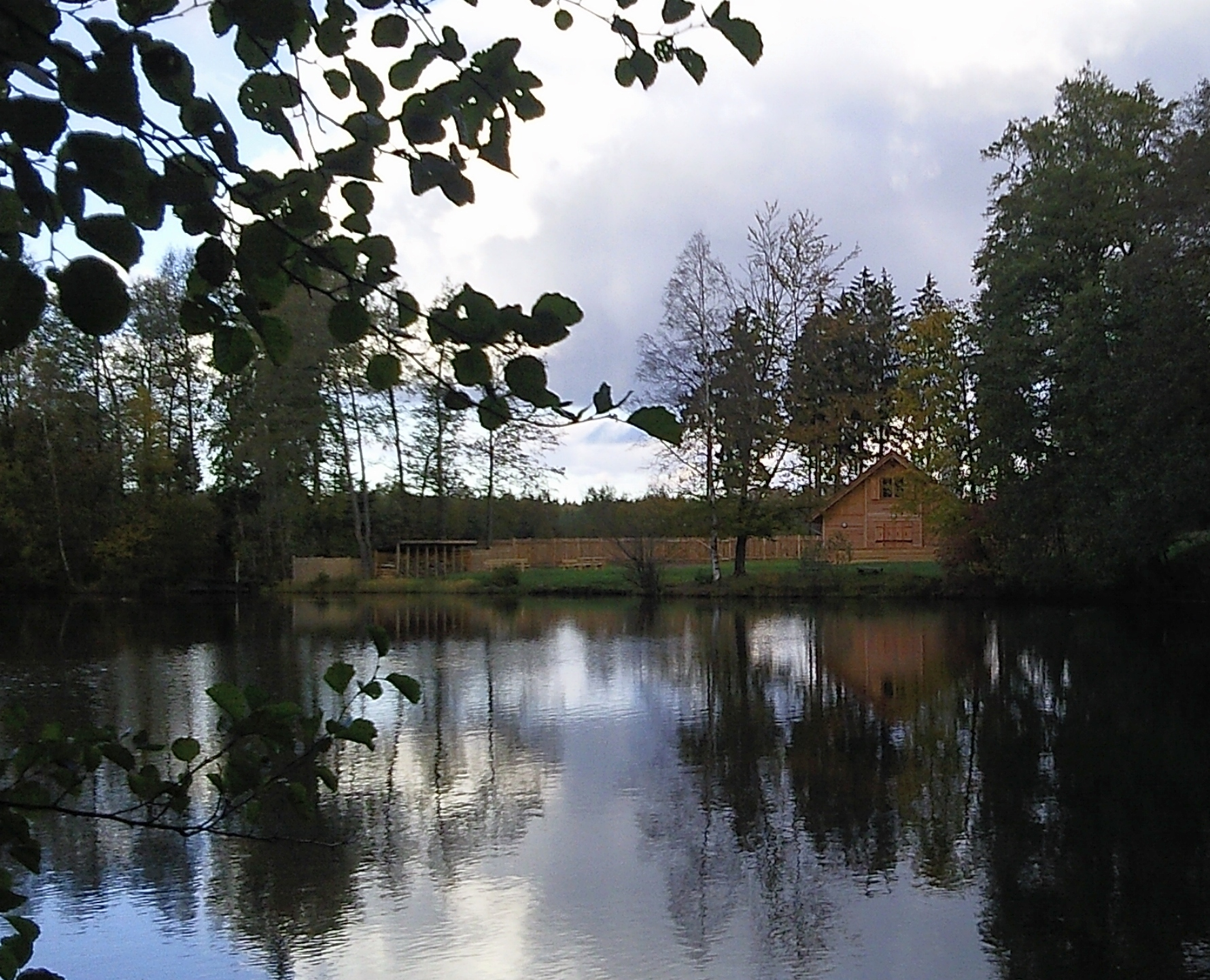 Gräfingründer Teich mit Blick auf das Forsthaus